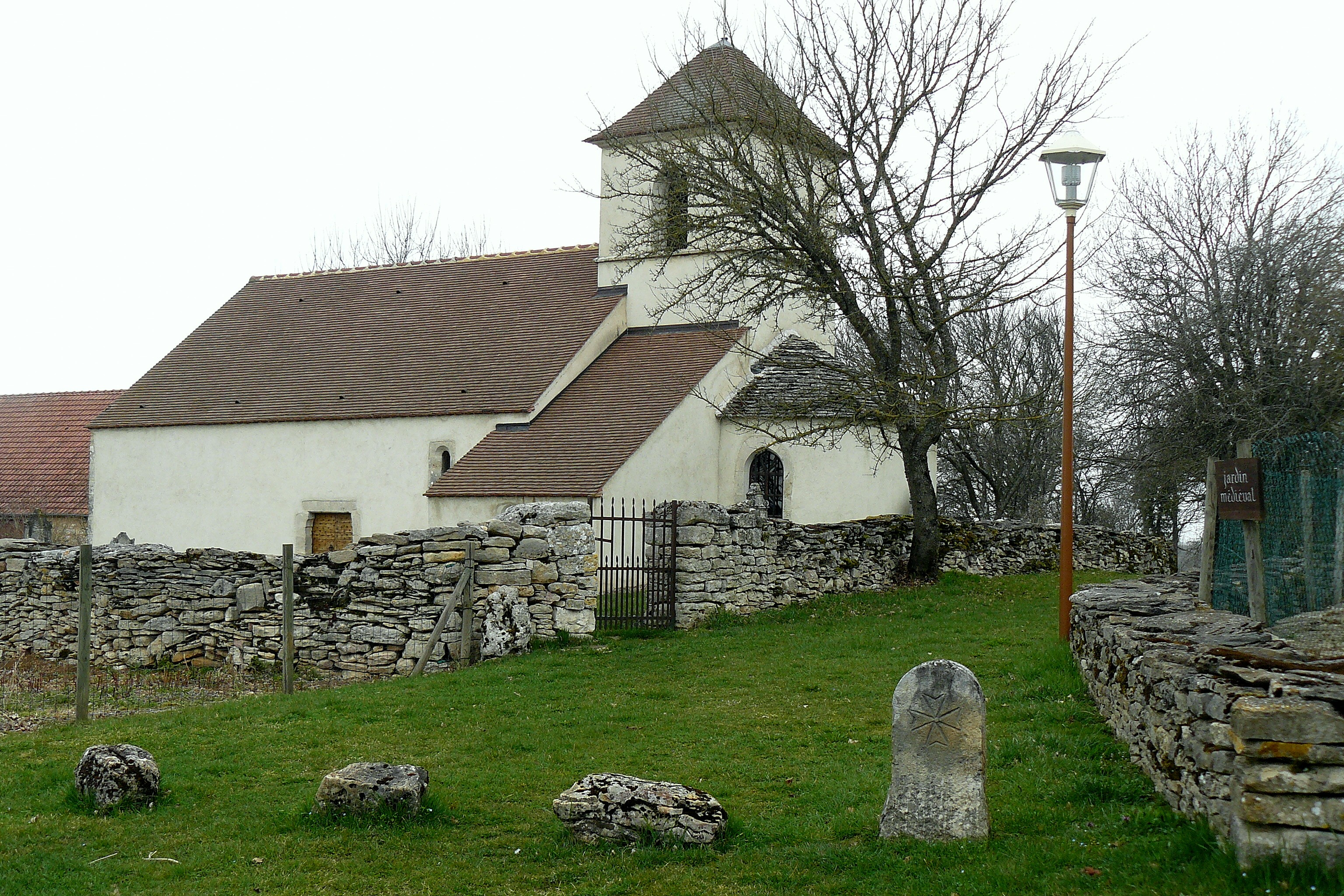 La chapelle d'Echarnant (Côte-d'Or, France)